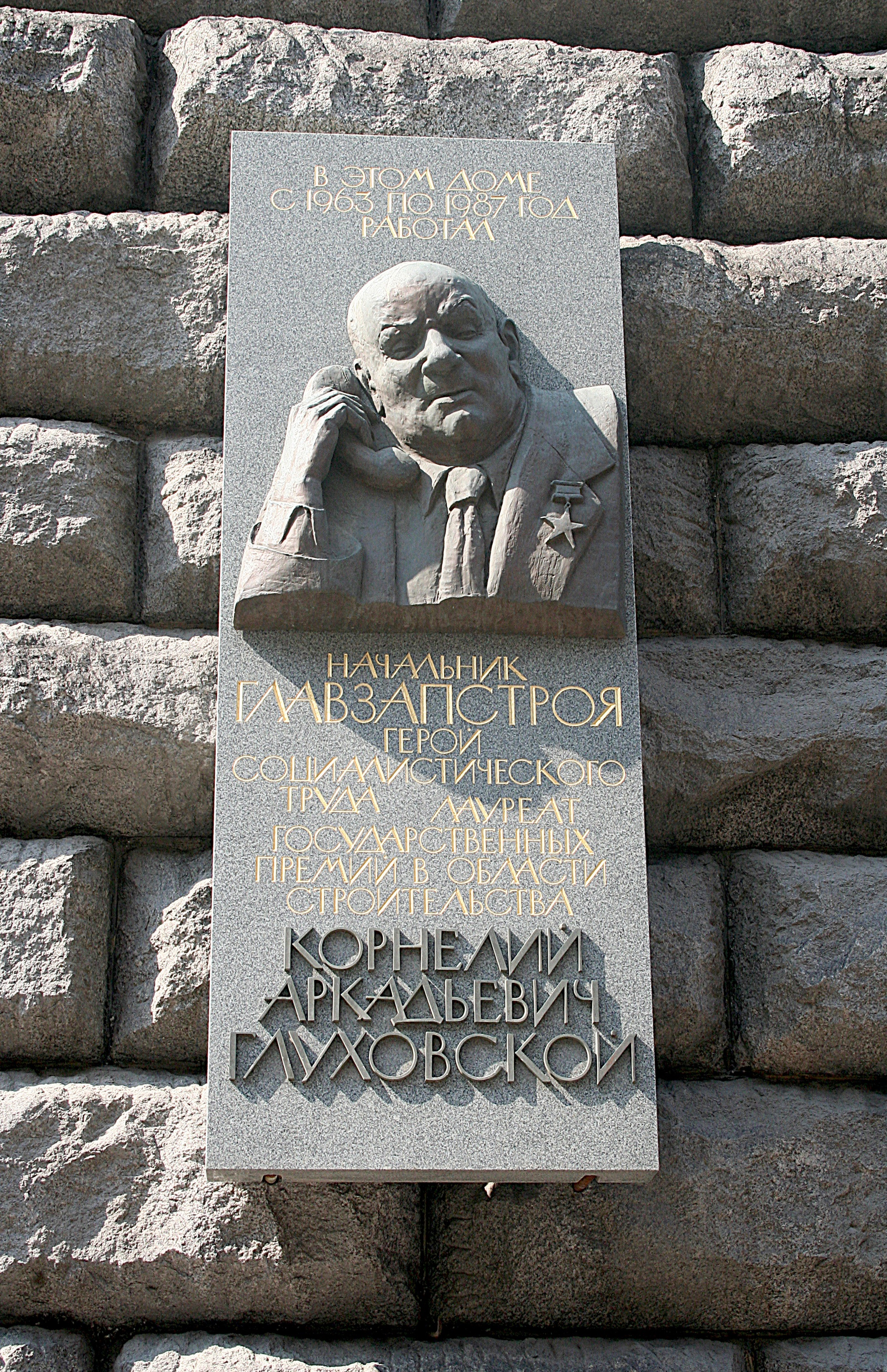 Здание Русского торгово-промышленного банка (Санкт-Петербург и Лен.область, Санкт-Петербург, б. Морская улица, 15)